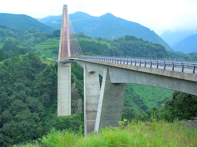 鮎の瀬大橋 くまもとアートポリス用にアップロードした画像です。 建築概要 設計― 大野美代子+中央技術コンサルタンツ 竣工― 1999年 構造― PC斜張橋,ラーメン橋 所在地― 上益城郡矢部町